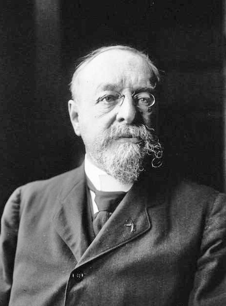 Mr Cochery, ancien ministre : photographie de presse